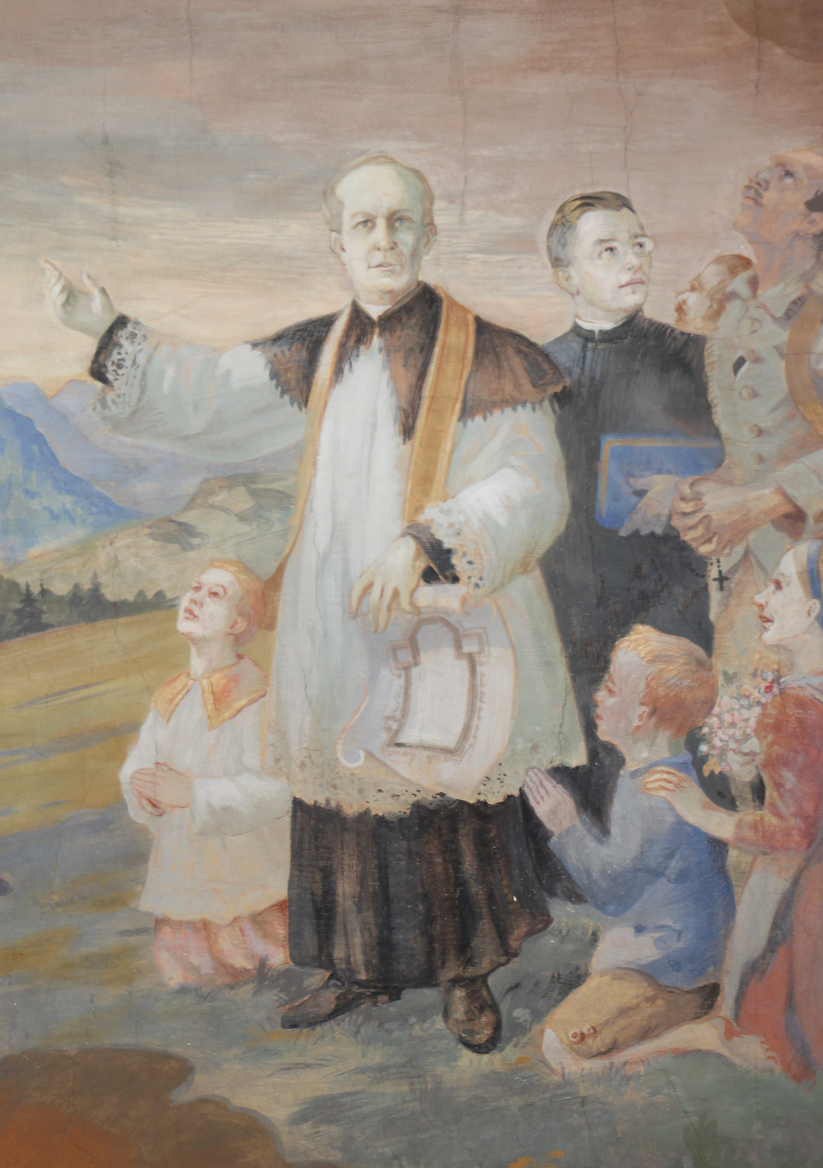 Deckenfresko in der Pfarrkirche Törwang